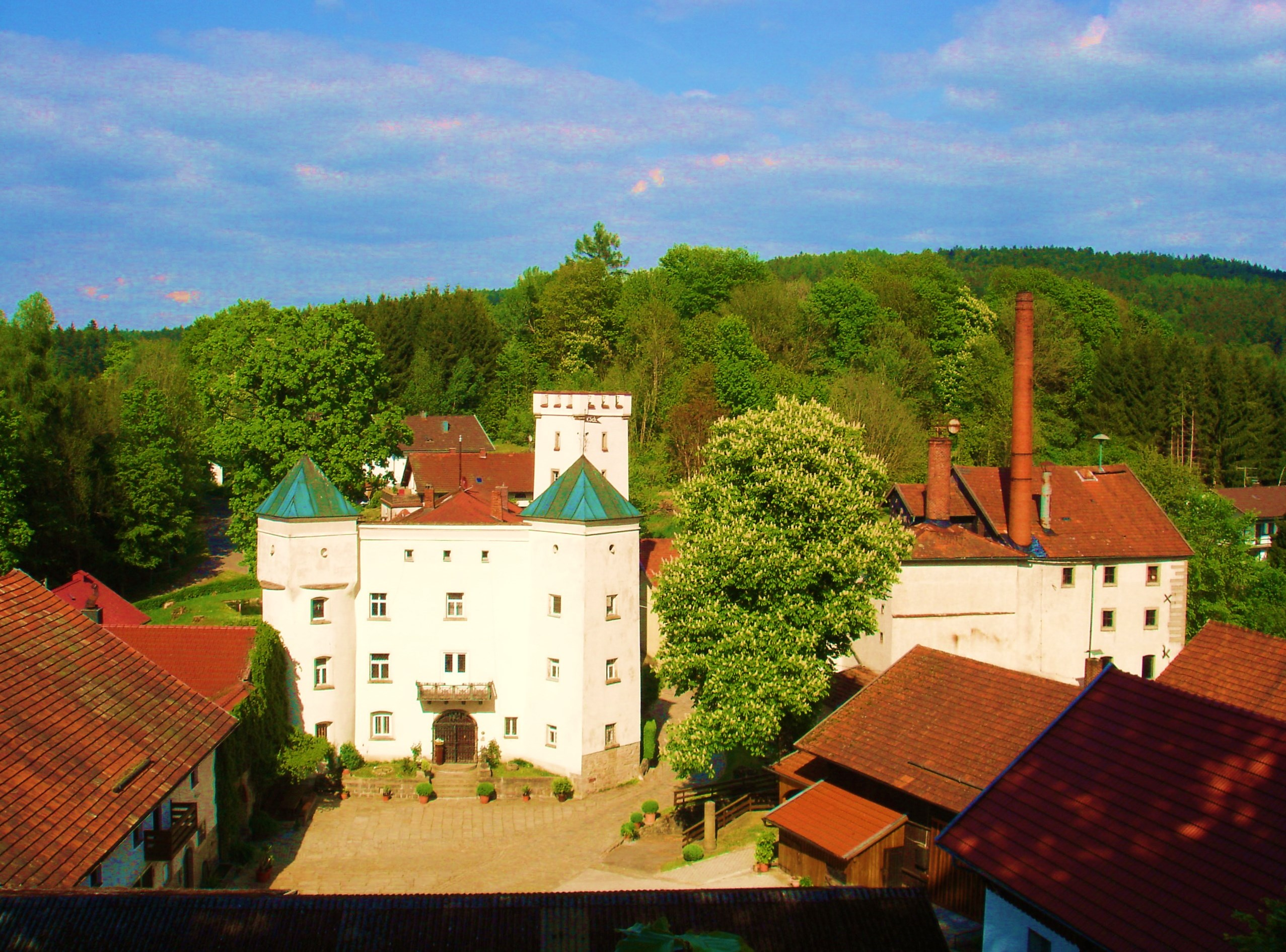 Schlosshof mit ehemaliger Brauerei in Sattelpeilnstein